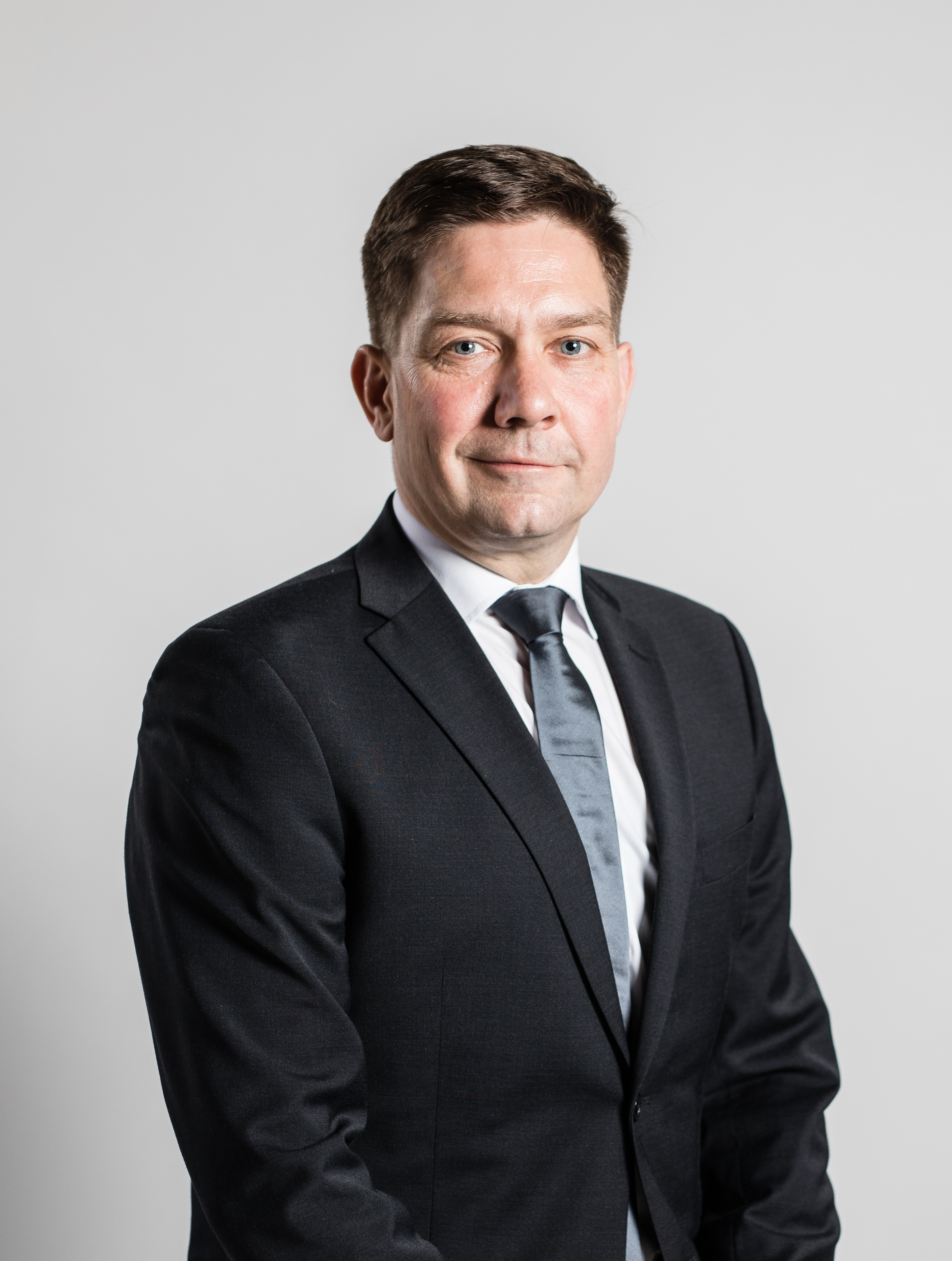 Pohjoismaisen yhteistyön ja tasa-arvon ministeri Thomas Blomqvist virallisessa valokuvassa. Kuva Valtioneuvoston kuvapankista.